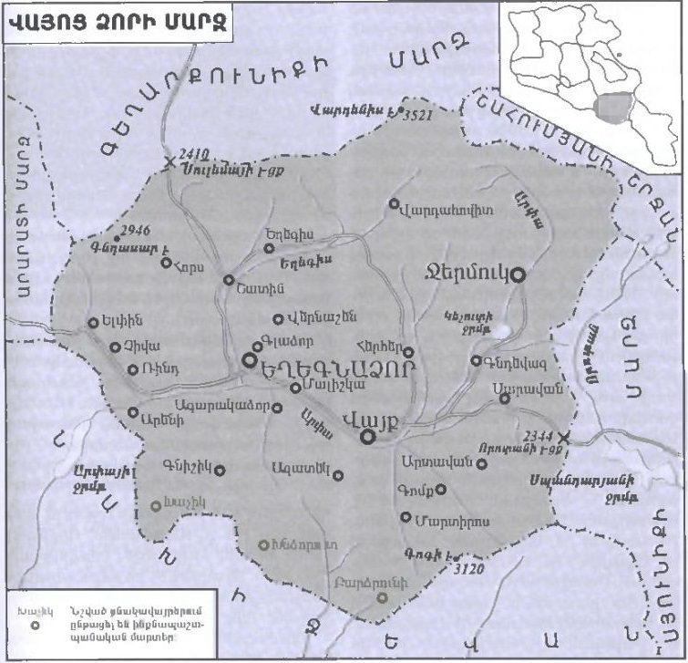 Վայոց ձորի քարտեզ